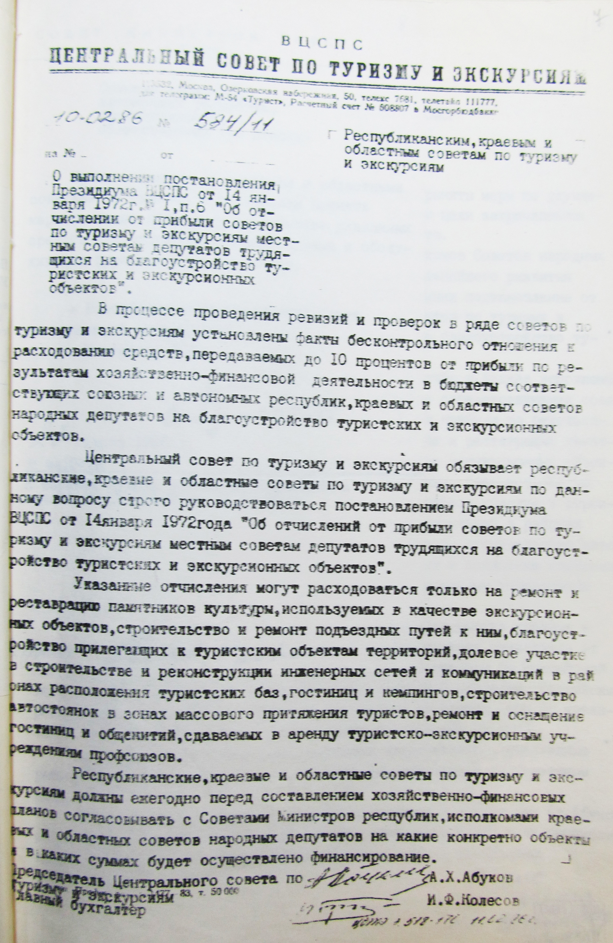 Письмо Центрального совета по туризму и экскурсиям 10.02.1986 №584/11 г. Республиканским, краевым и областным советам по туризму и экскурсиям о выполнении постановления Президиума ВЦСПС от 14 января 1972 года №1 п.6 «Об отчислении от прибыли советов по туризму и экскурсиям местным советам депутатов трудящихся на благоустройство туристских и экскурсионных объектов». Источник: ГАРФ. Ф. A259. (Совет Министров РСФСР (Совмин РСФСР). Оп. 48 (Управление Делами (переписка дела). Дела постоянного хранения 1979-1986 гг.). Д. 8020 (Дело о мерах по развитию туризма и совершенствованию туристско-экскурсионного обслуживания населения в РСФСР в 1986-1990 гг. и на период до 2000 г.). Л. 7